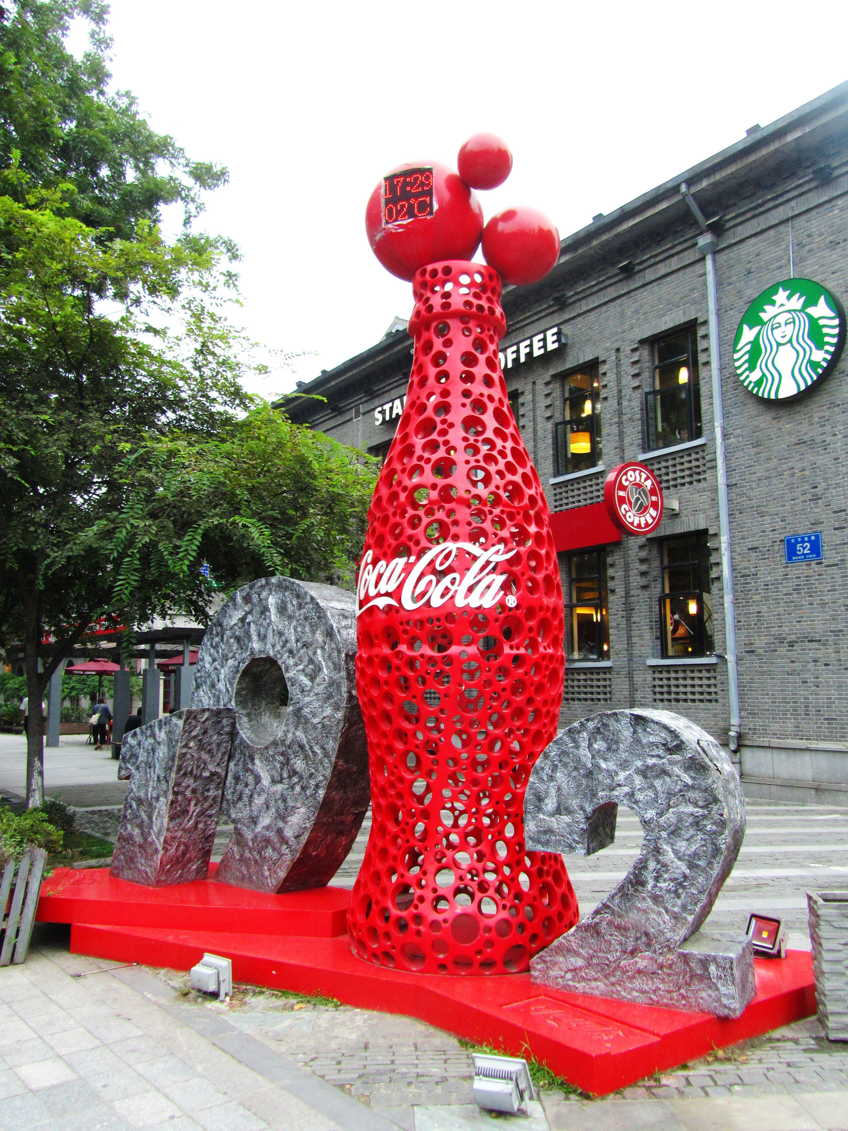 南京1912商业街内的标志性公共雕塑。